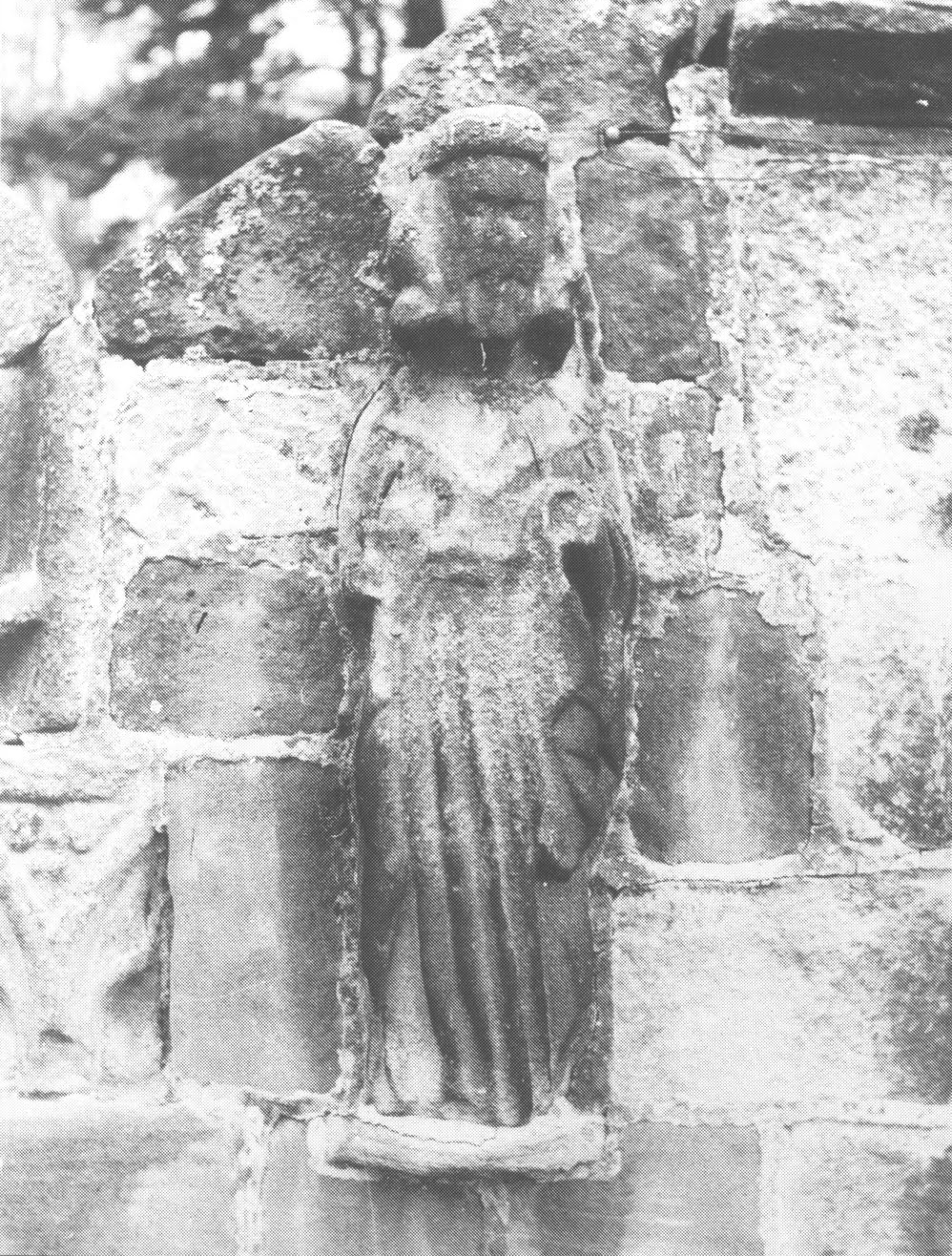 Statue datée du quatorzième siècle, représentant probablement un roi, provenant de l'abbaye cistercienne de Dieulacres (Staffordshire) et intégrée au portail de la ferme de l'abbaye.